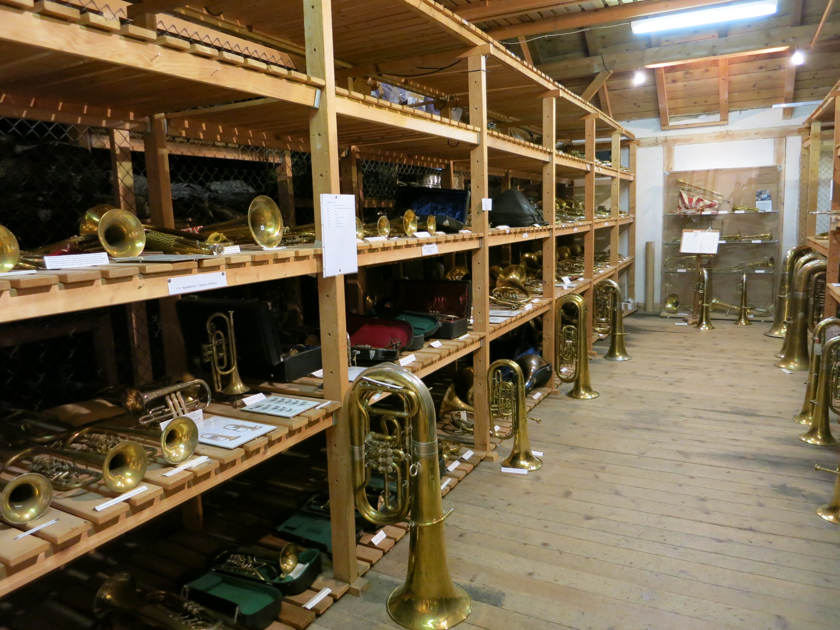 Museum im Zeughaus, Schaffhausen SH, Schweiz